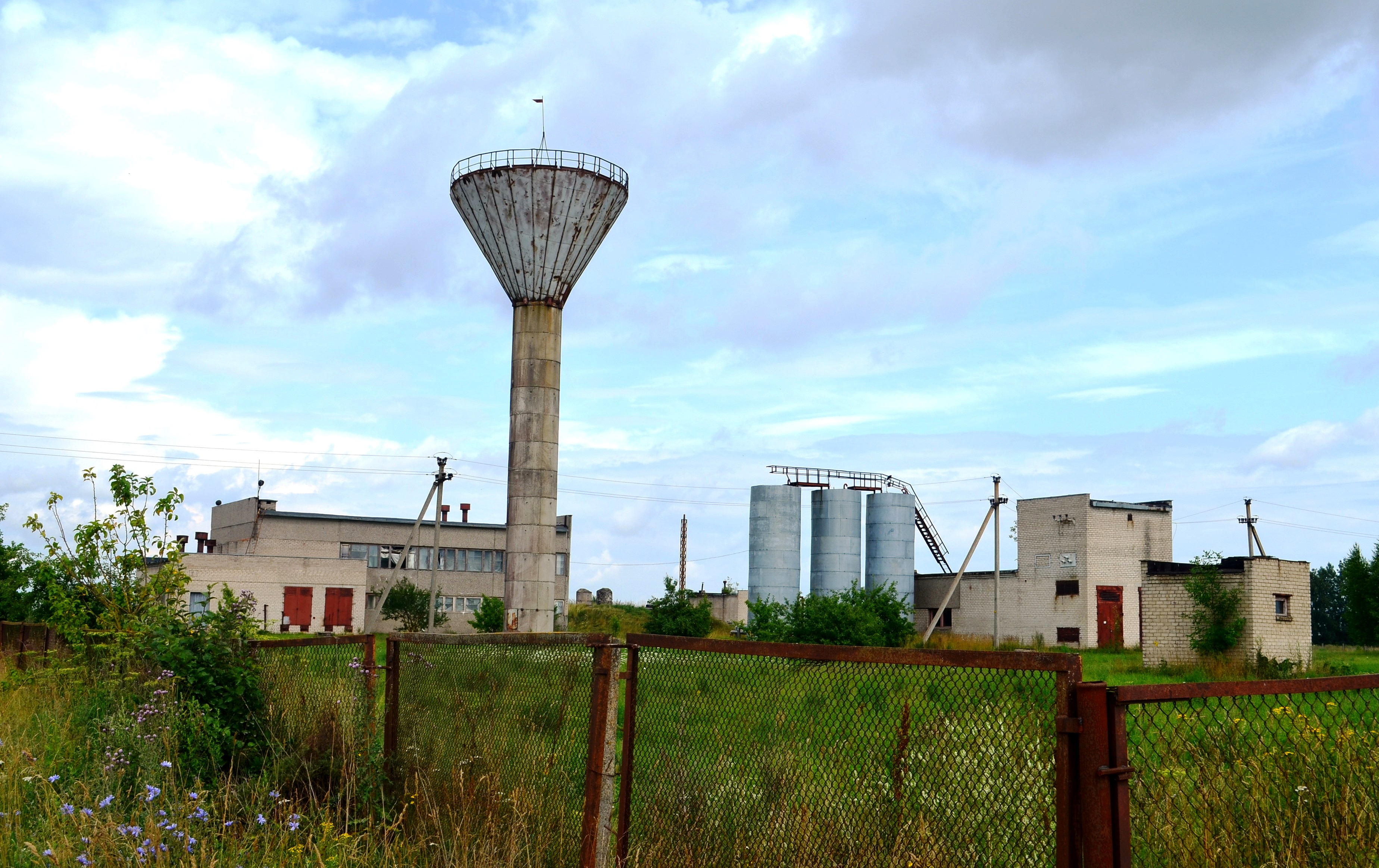 Gėlainių vandenvietė, Kėdainių raj.